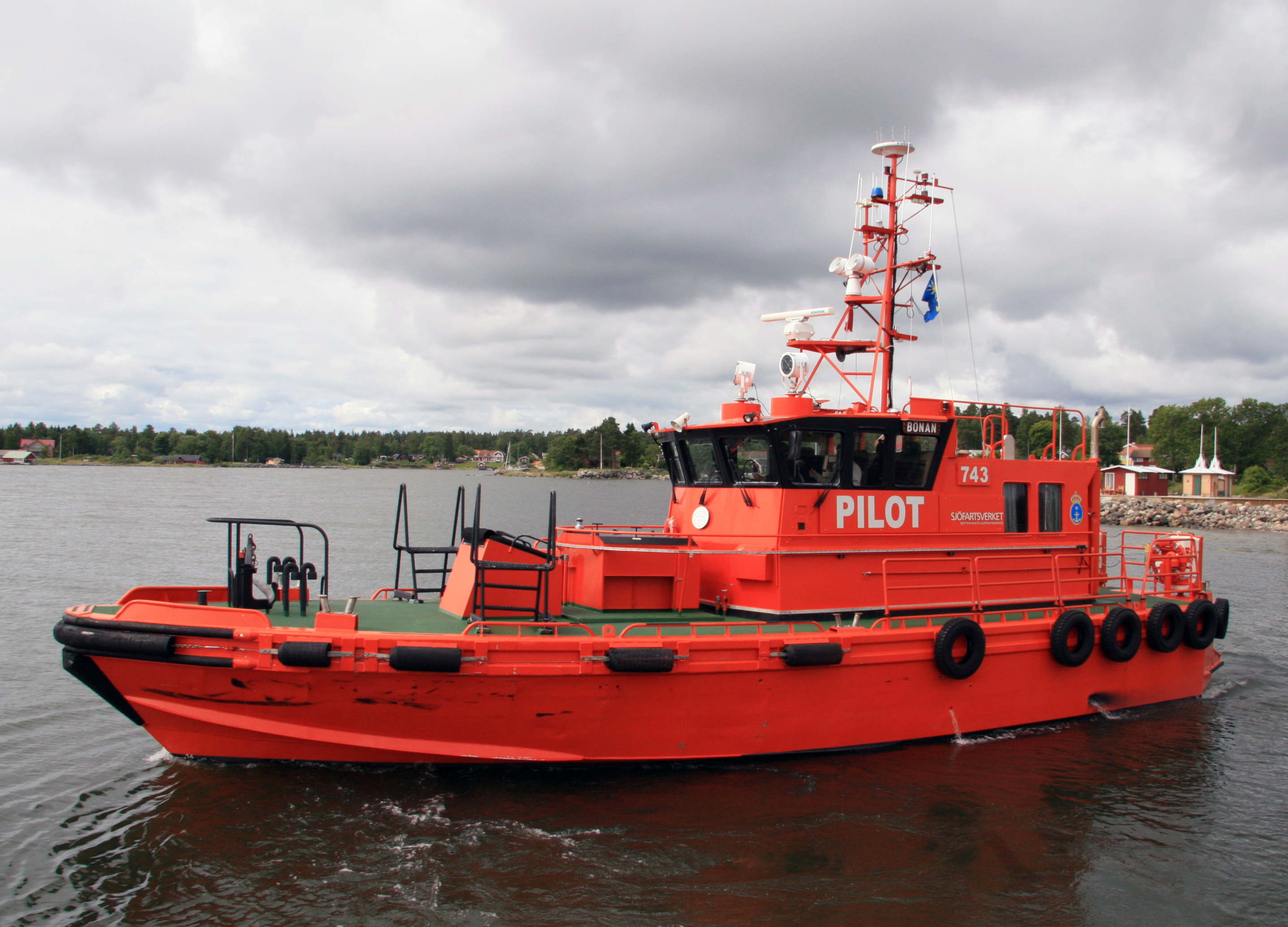 Pilot 743 SE vid Bönan, Gävle 6 juli 2008